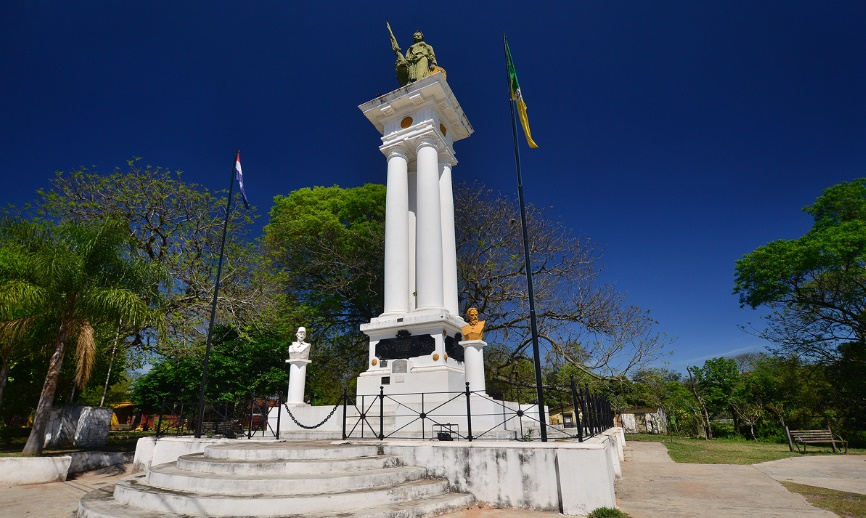 Monumento a los héroes de la Batalla de Ytororô